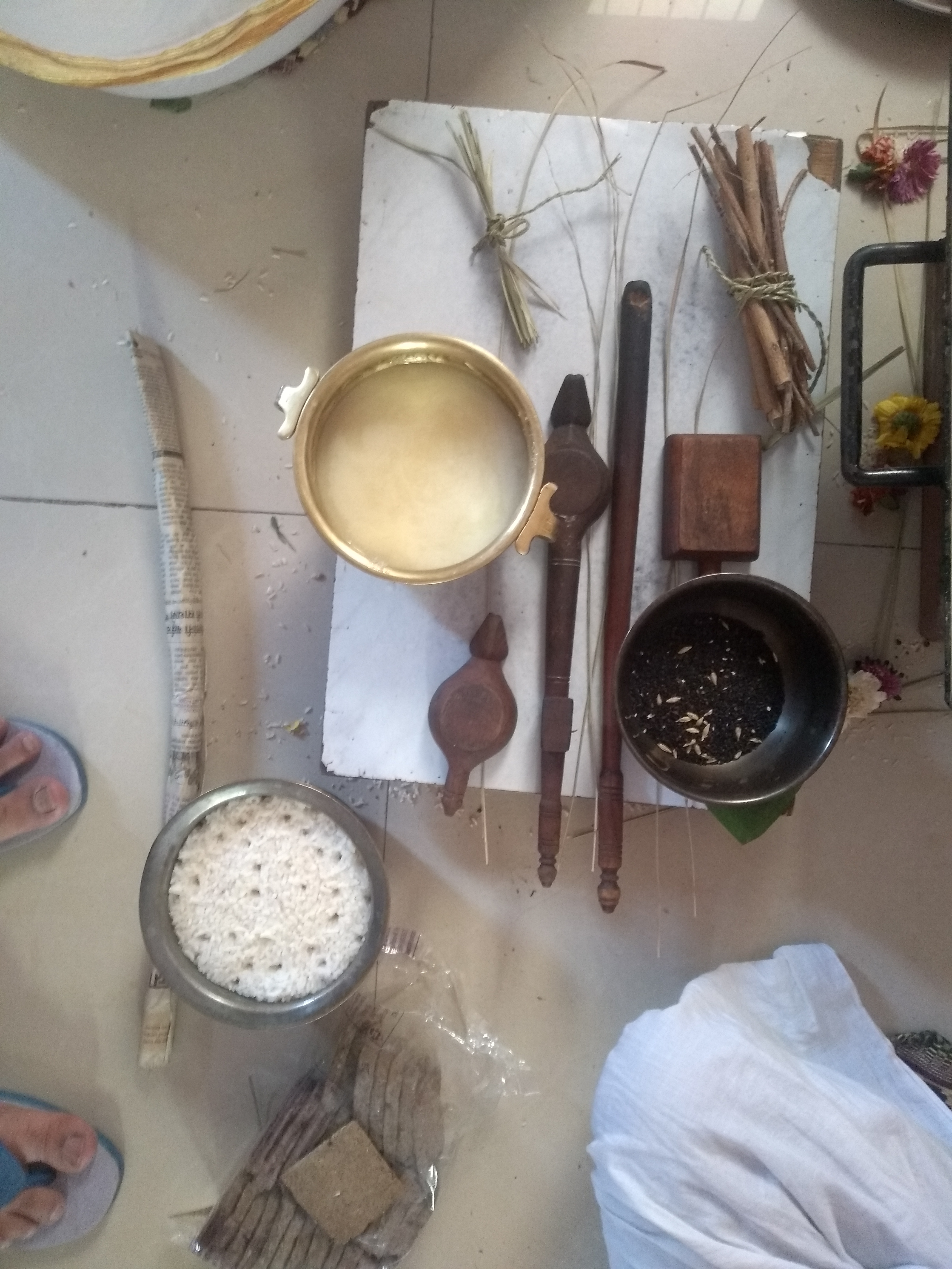 Hindu rituals